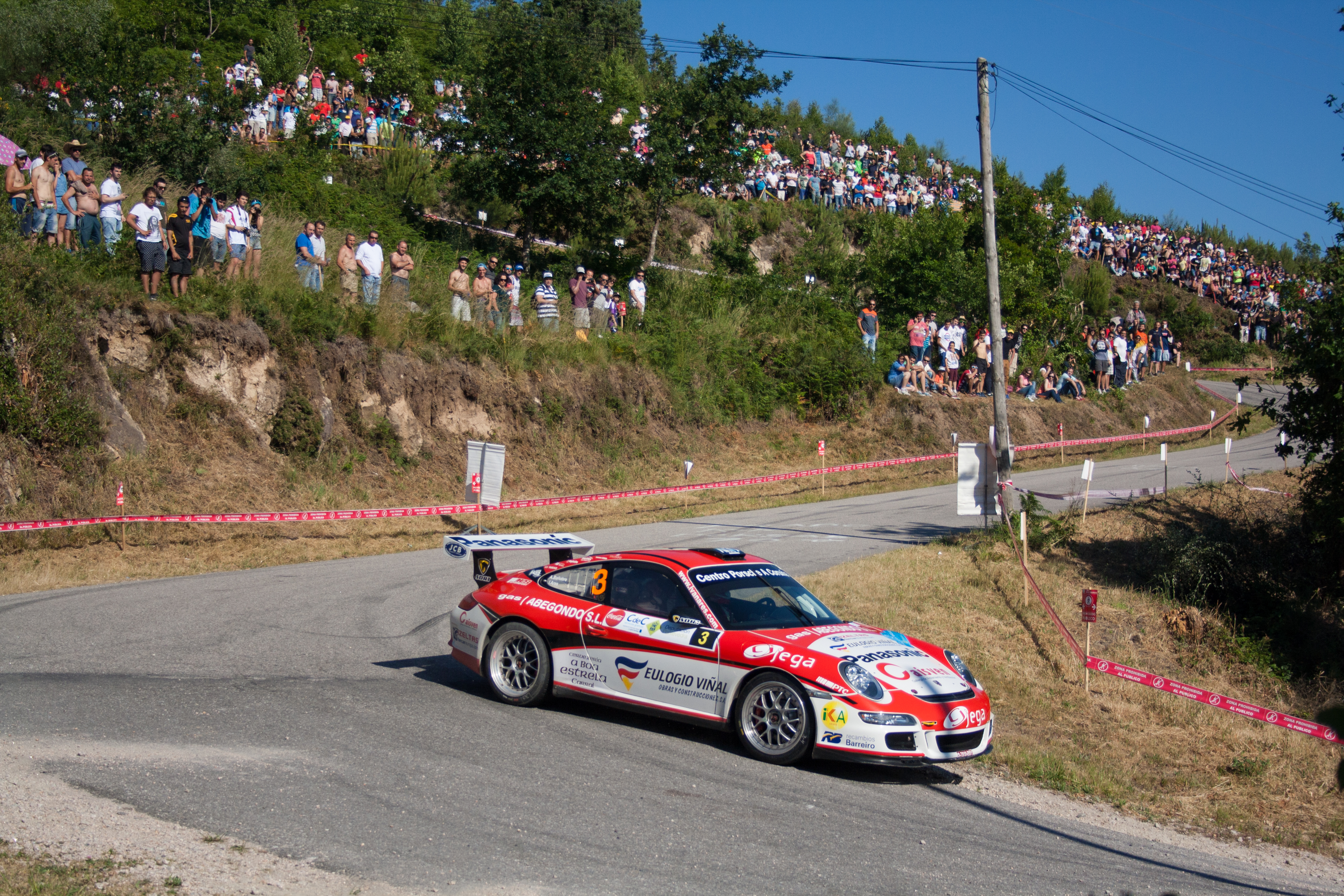 TC 2-4 (Nigrán)